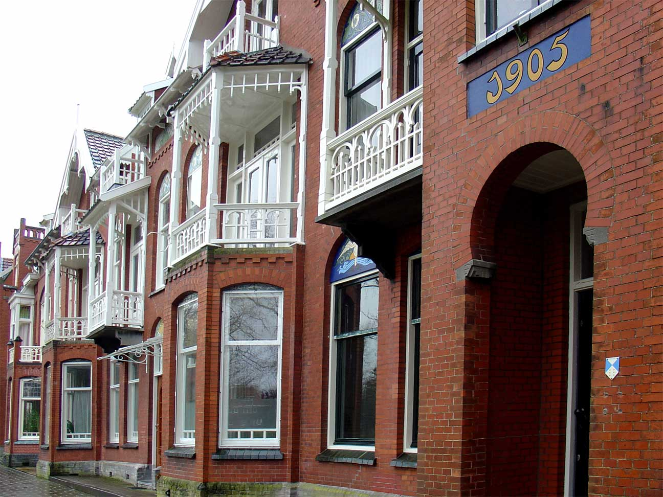 Jugendstilpanden uit 1905 in de Van Beverninglaan te Gouda